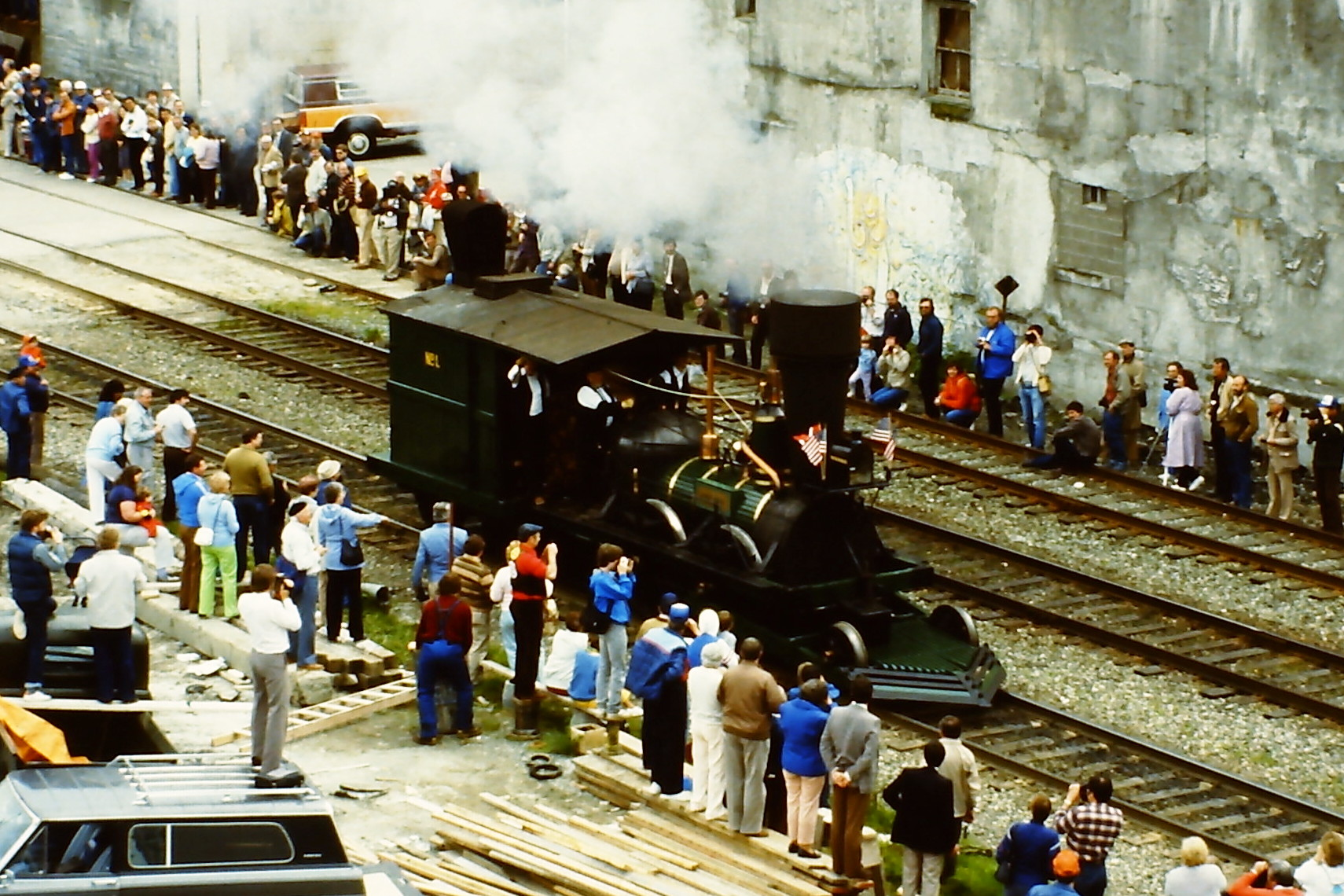 Dampflokomotive „John Bull“ (Replikat) auf der SteamExpo 86